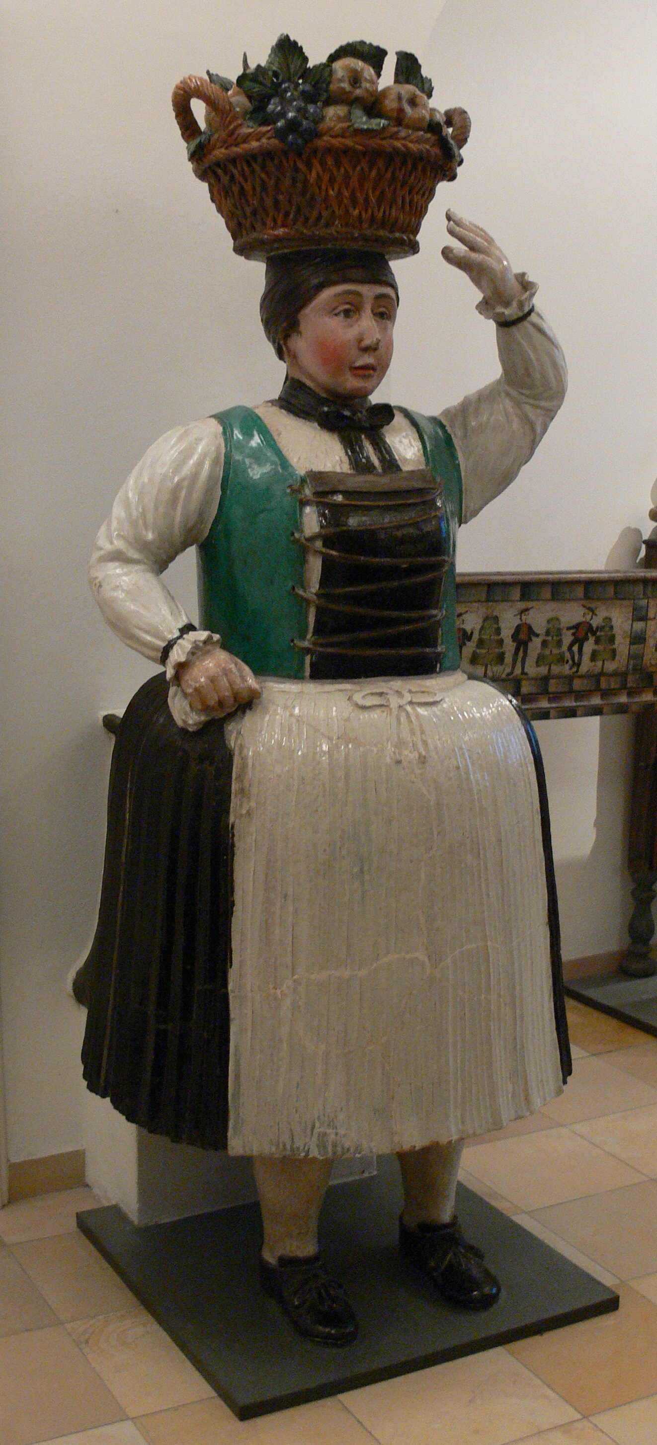 Kachelofen "Annamirl", Münzbach, Bezirk Perg (Oberösterreich) um 1740, aus dem Gasthaus Korninger in Münzbach (später Sammlung des Thronfolger Franz Ferdinand, von dort in das ÖMV) Wien, Österreichisches Museum für Volkskunde, ÖMV-Inv.Nr. 35.876